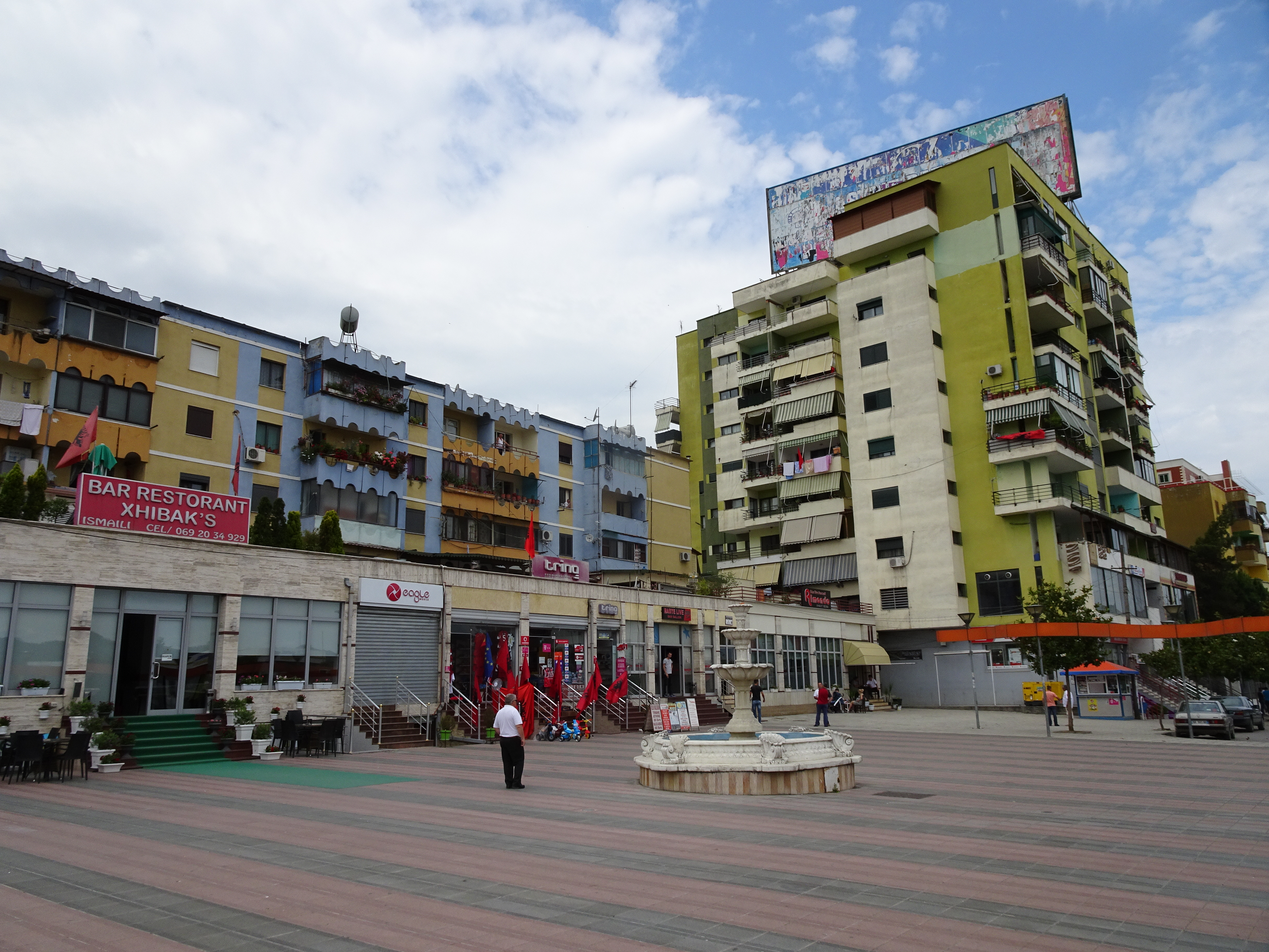 Vora Albanien Ortszentrum